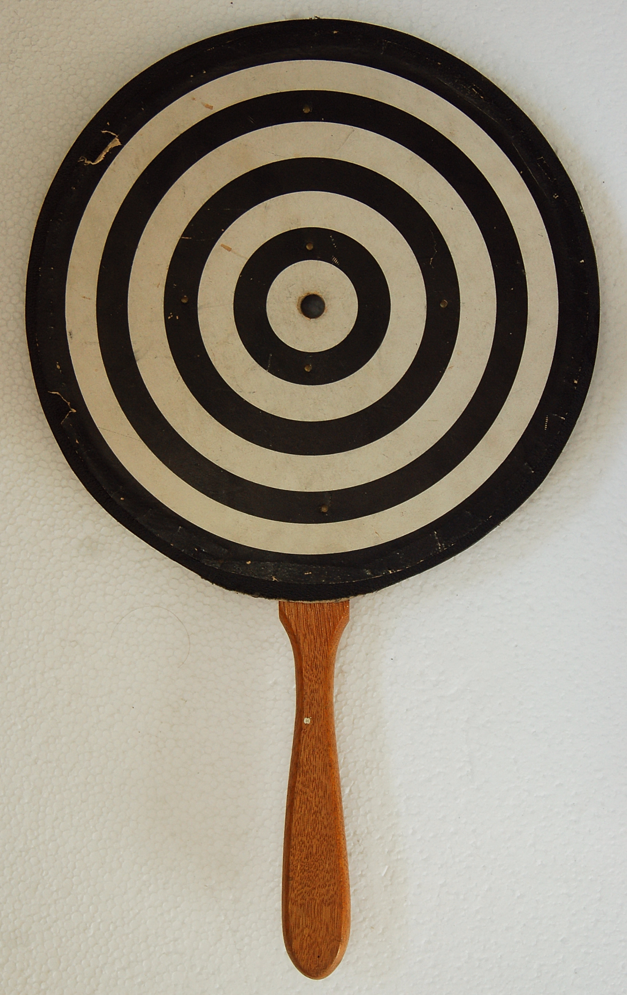 Äldre Placidos keratoscope, På svenska även benämnd Placidos skiva